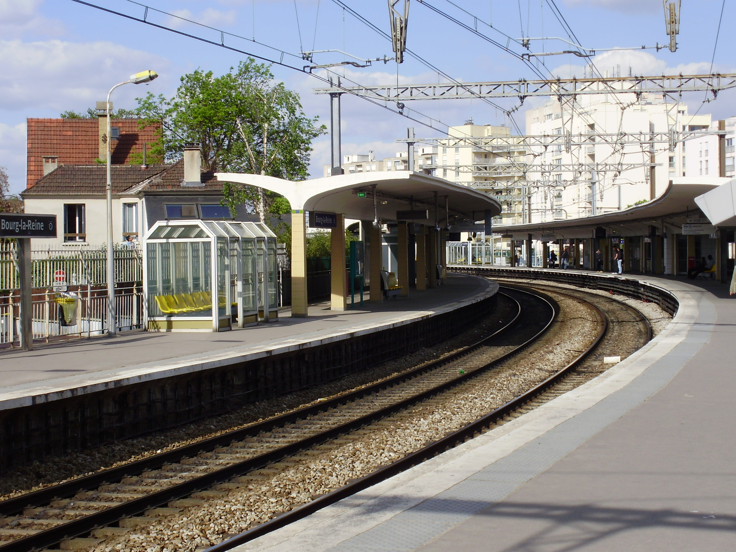 Gare de Bourg-la-Reine, Hauts-de-Seine, France (quais et voies en regardant vers le nord, depuis le quai pour Robinson)